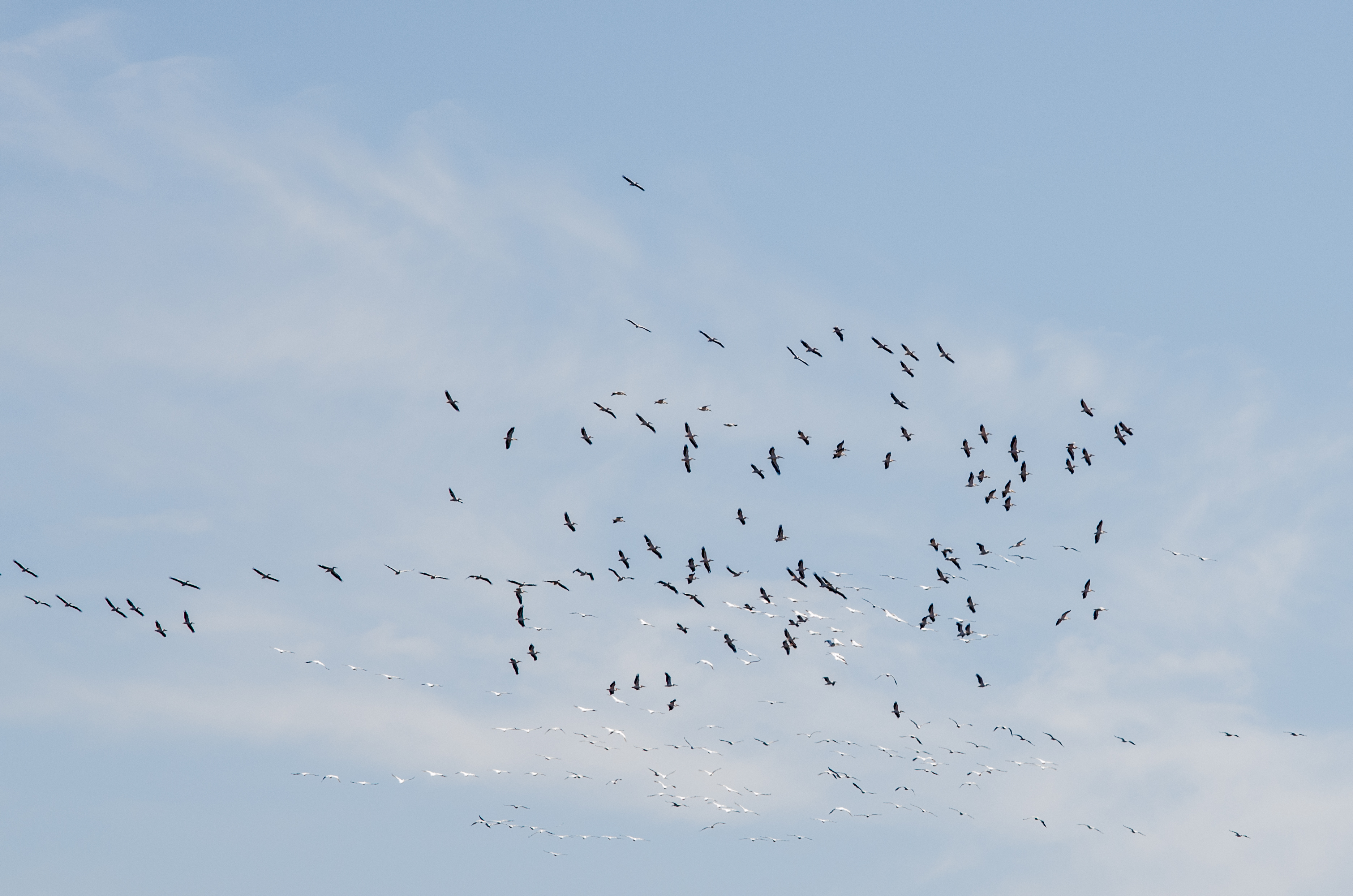 Джарилгацький, Скадовський район, кв.кв. 109, 110, 124, 125 ДП «Скадовське ДЛМГ»